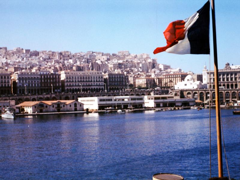 envoi de J. Varlot